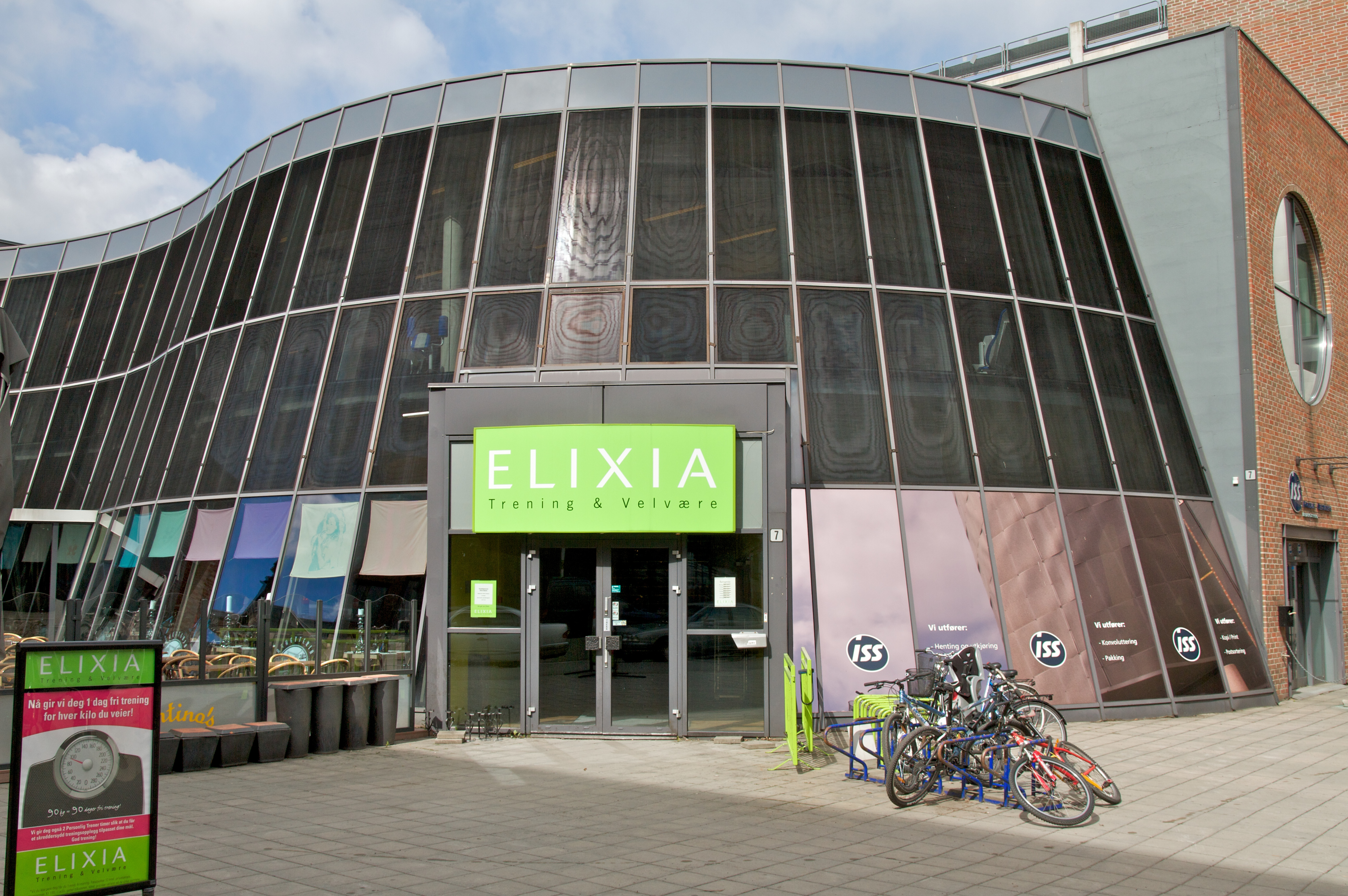 Elixia, Karenslyst allé i Oslo.